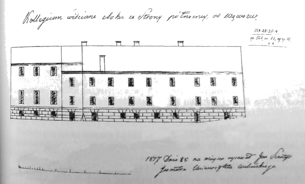 Беларуская (тарашкевіца): Наваградак (Navahradak), вуліца Траецкая (vulica Trajeckaja). Калегіюм езуітаў